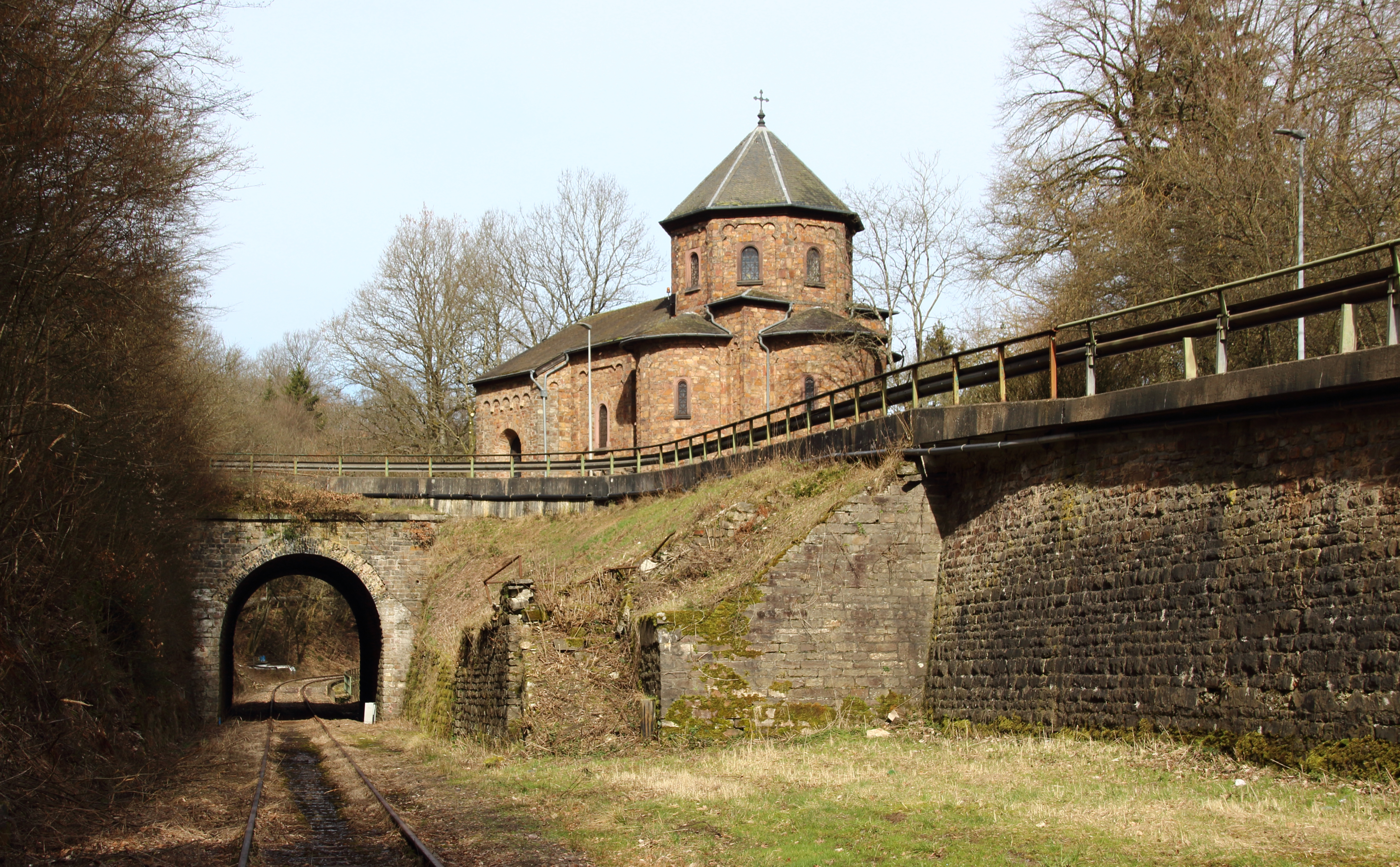 Gruftkapelle St. Maria und St. Michael der Familie Puricelli. Bruchsteinsaal, 1857, Erweiterung mit Trikonchos und Vierungsturm, 1906, Architekt Eduard Endler. Tunnel und ehemaliger Haltepunkt Rheinböllerhütte der Hunsrückquerbahn bei Kilometer 22,4. Rheinböllerhütte, Rheinböllen